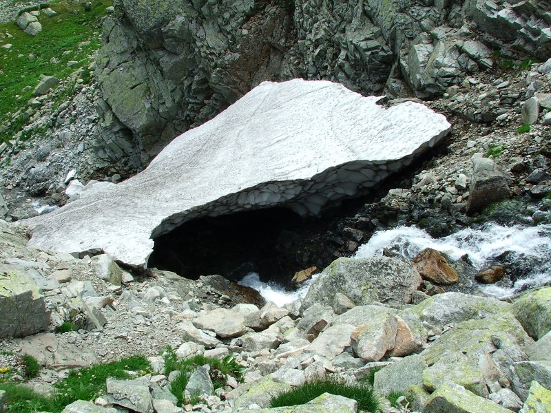 Vareškové oko